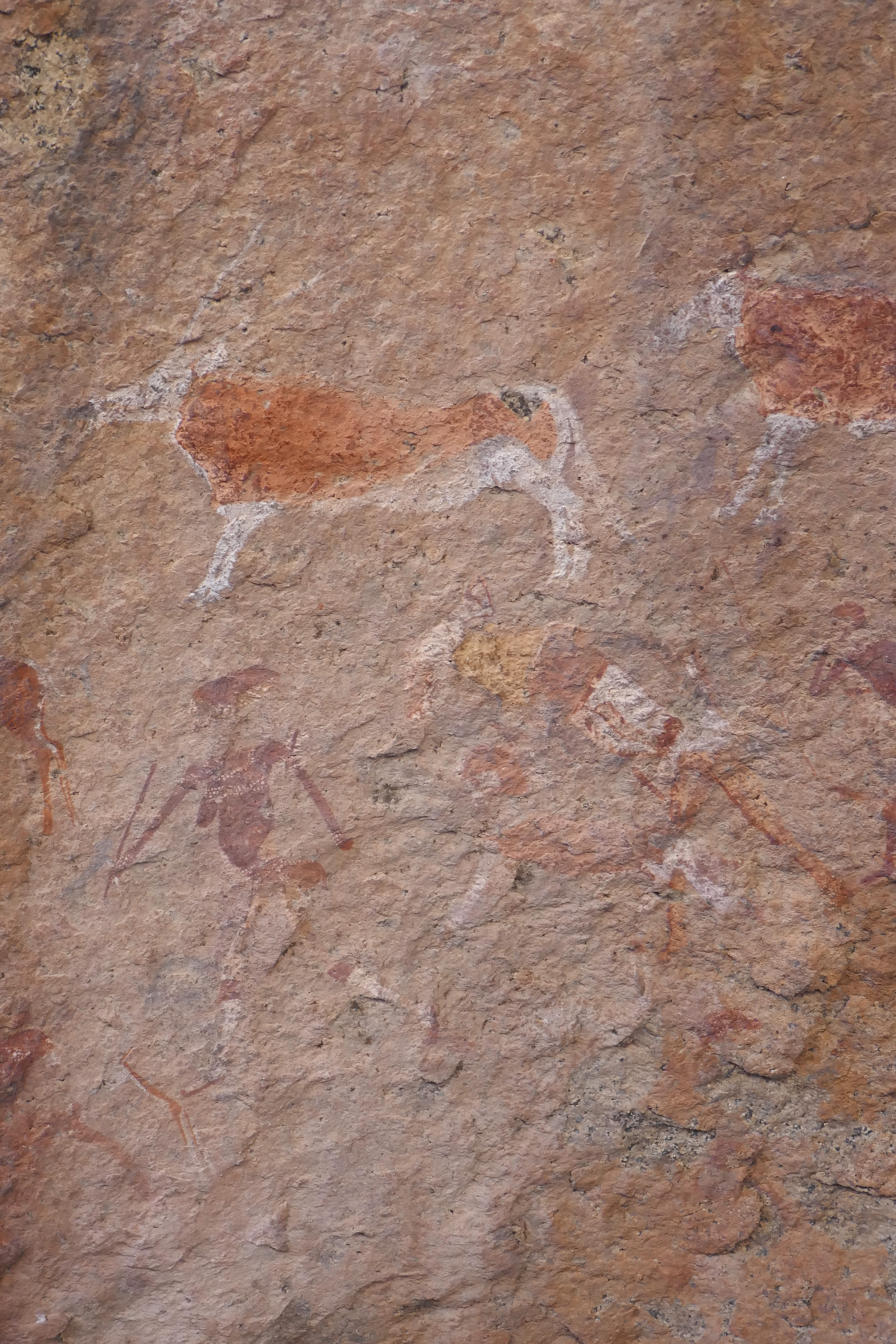 Peintures rupestres San (appartenant à la fresque connue sous le nom de White Lady) dans le massif du Brandberg en Namibie.